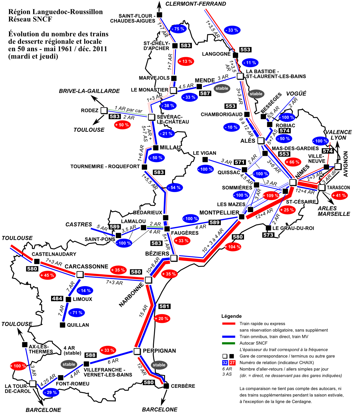 Évolution du nombre des trains de desserte régionale et locale en 50 ans - mai 1961 à décembre 2011 (comparaison des omnibus, trains directs, trains MV, express et rapides sans réservation et sans supplément en 1961 avec les TER et Intercités sans réservation obligatoire en 2011). Les autocars TER en 2011 ne sont pas pris en compte, ni les trains saisonniers circulant seulement de fin juin à début ou fin septembre, hormis pour la ligne de Cerdagne.